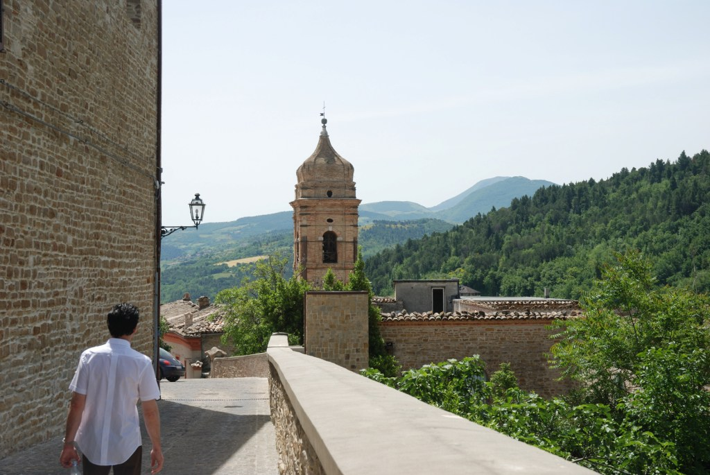 Serra San Quirico, provincia di Ancona, Italia.